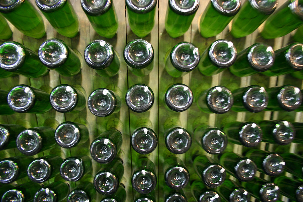 Sektkellerei in Artjomowsk, Ukraine